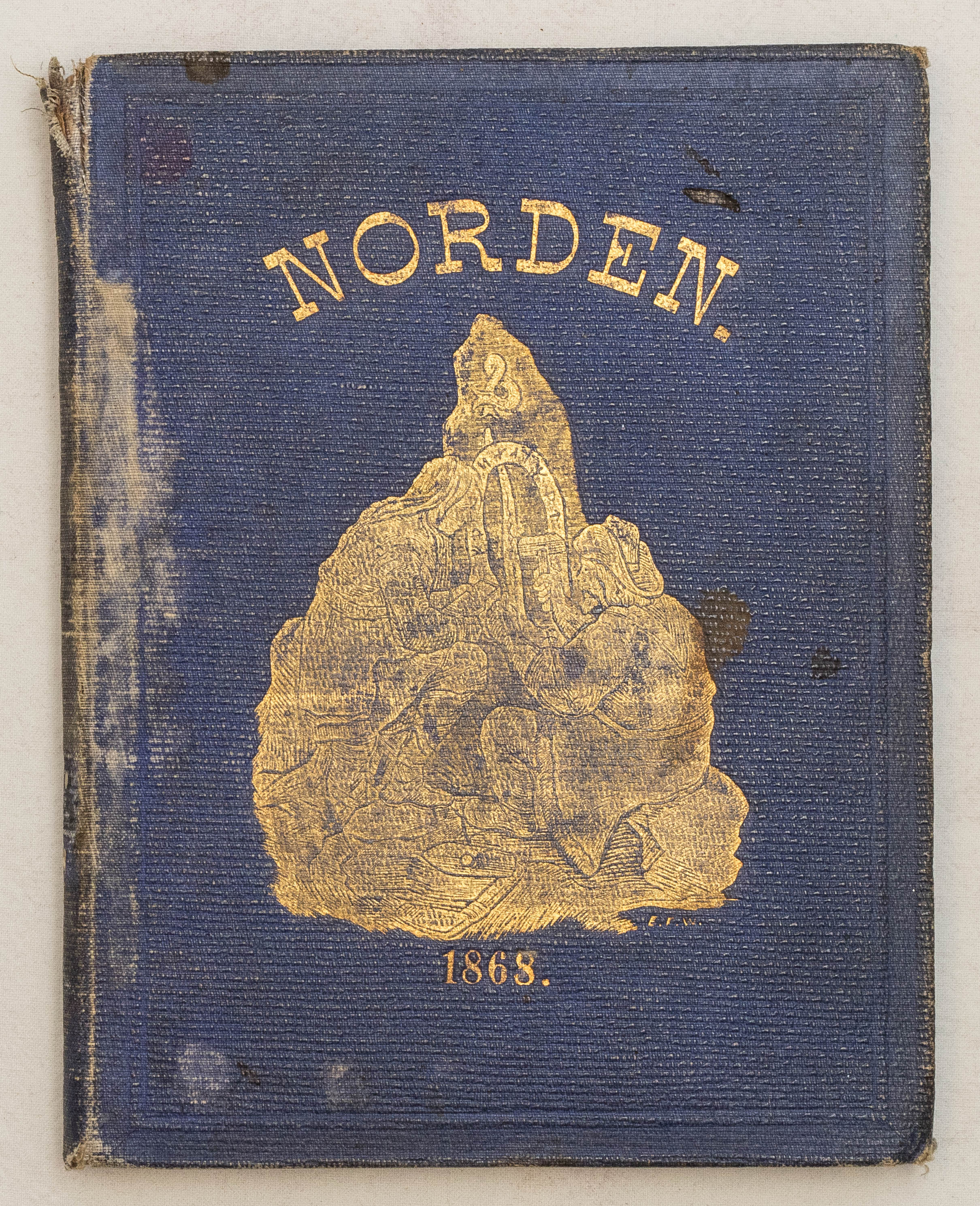 Framsidan av omslaget till Norden : national-kalender för år 1868 (